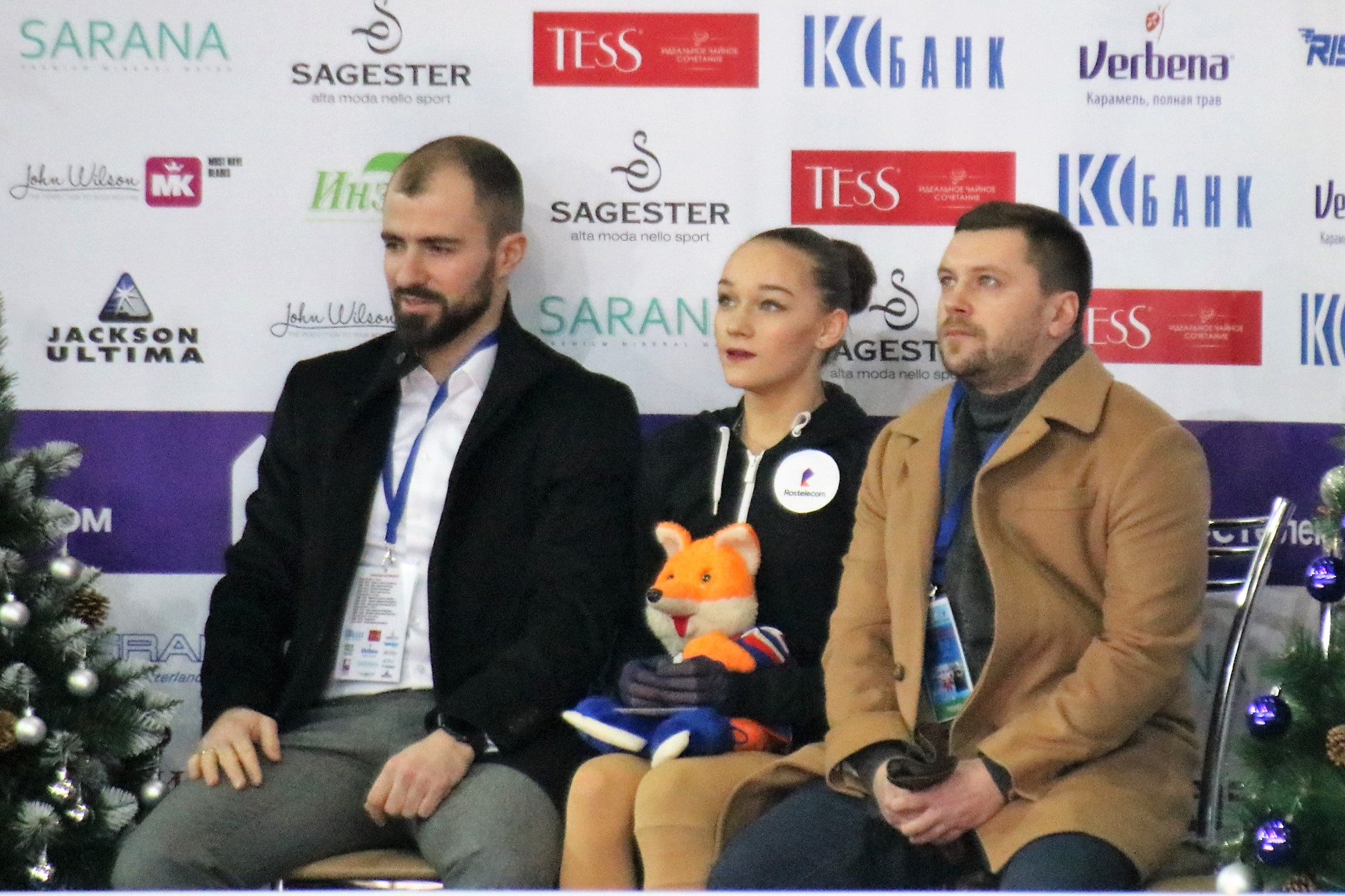 Анна Тарусина c тренерами Сергеем Давыдовым (справа) и Сергеем Вербилло (слева) на чемпионате России по фигурному катанию на коньках 2019